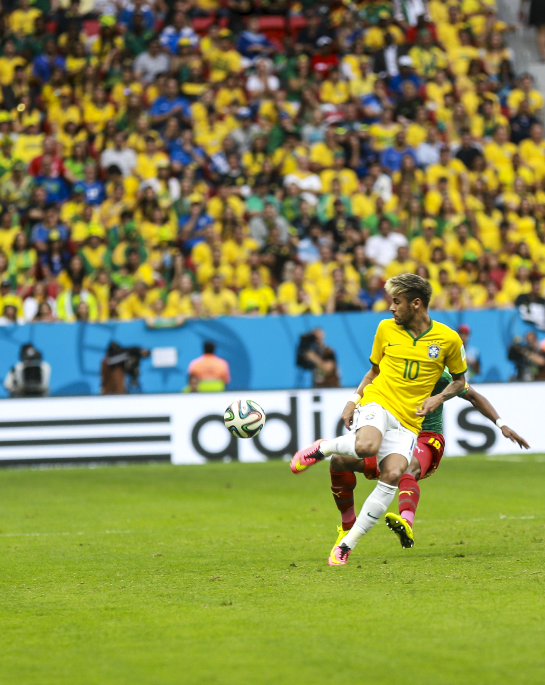 Brasil x Camarões, no Estádio Nacional Mané Garrincha em Brasília.